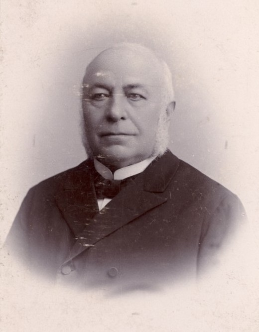 Vojtěch Weidenhoffer (1826 - 1901), Rakouský a český podnikatel a politik.